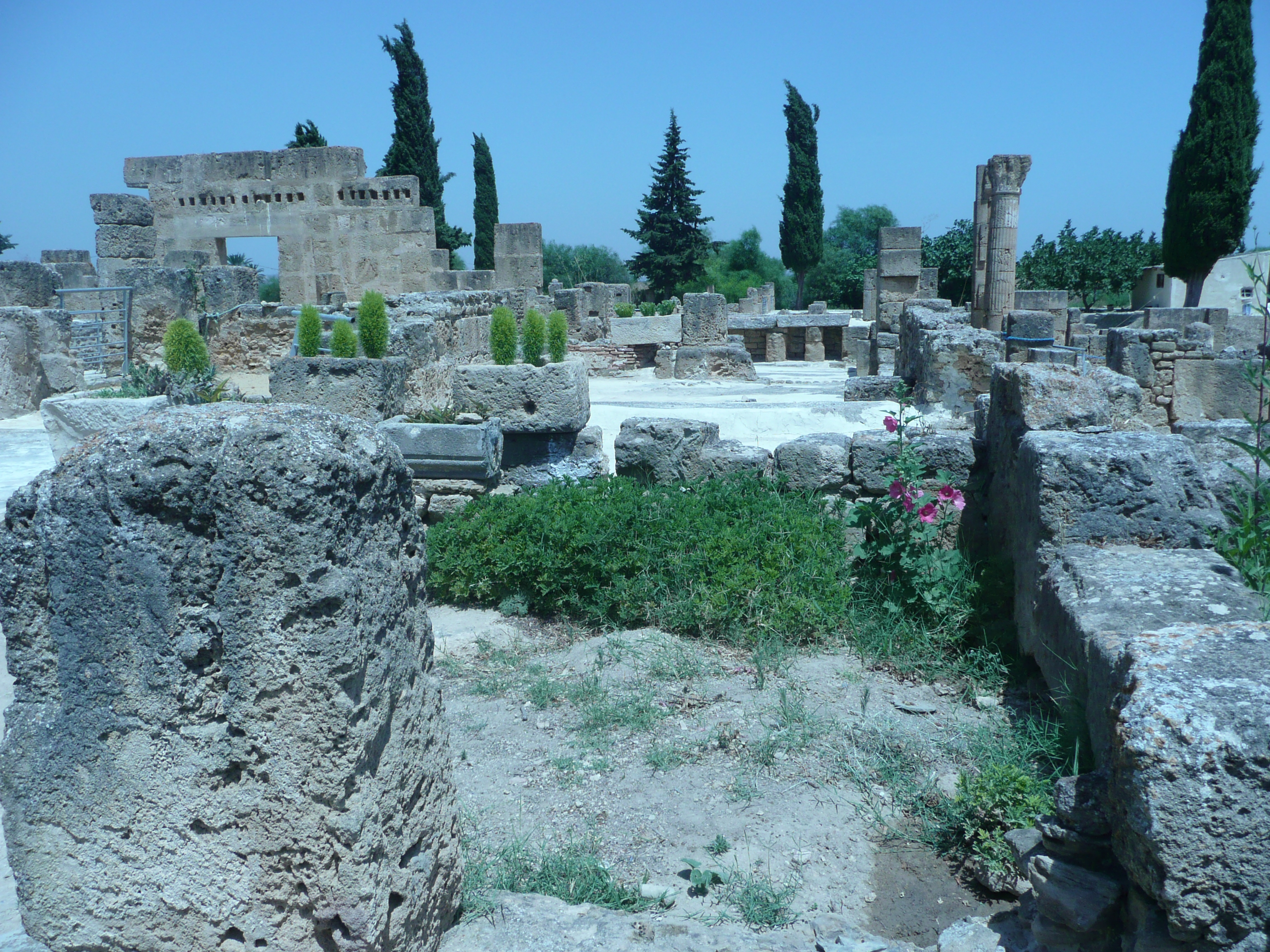 Vestiges d'habitations romaine, Utique